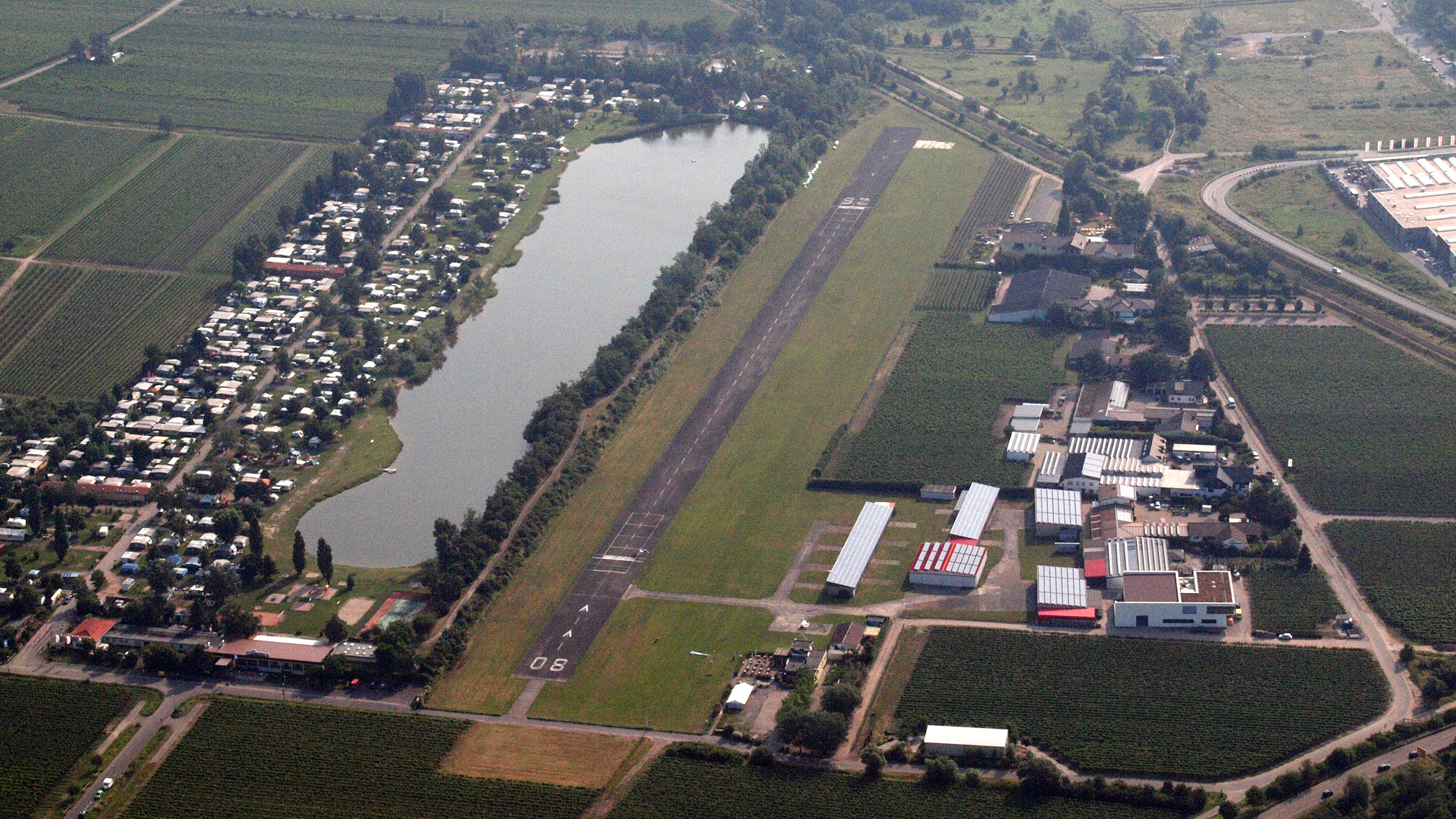 Flugplatz Bad Dürkheim